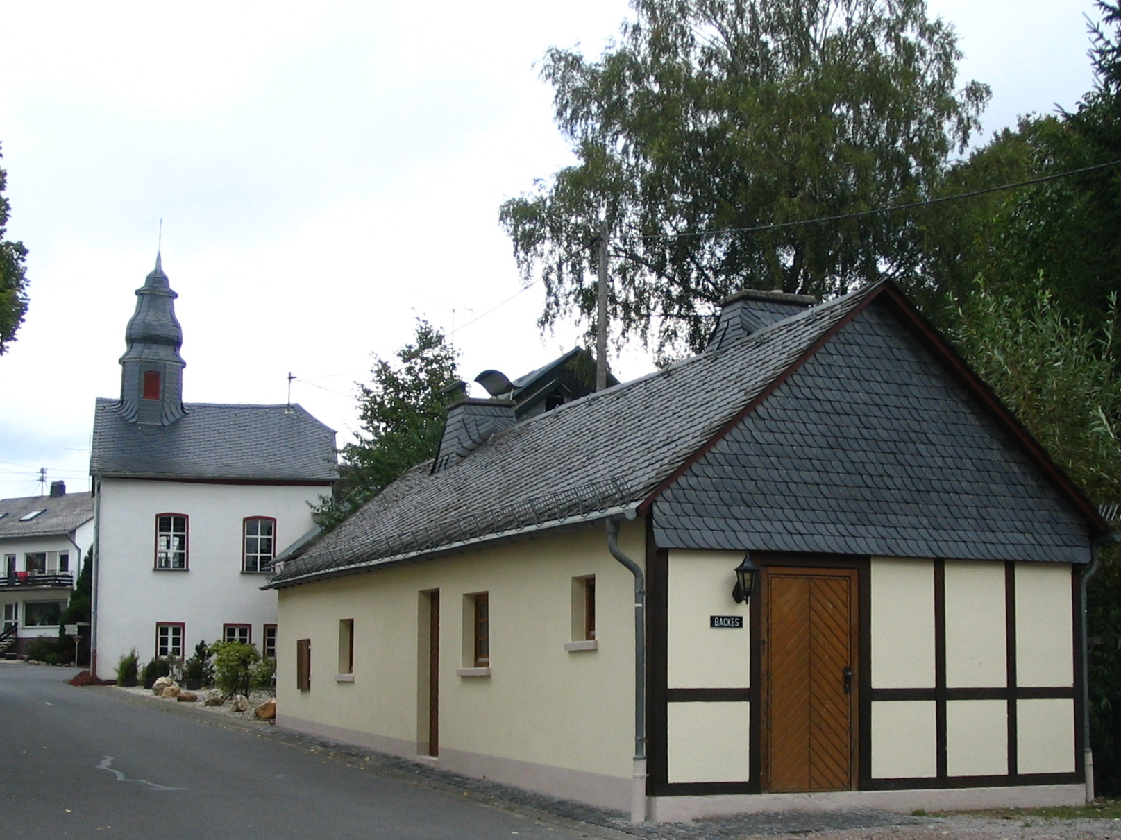 Backhaus und ev. Kapelle Niederkumbd